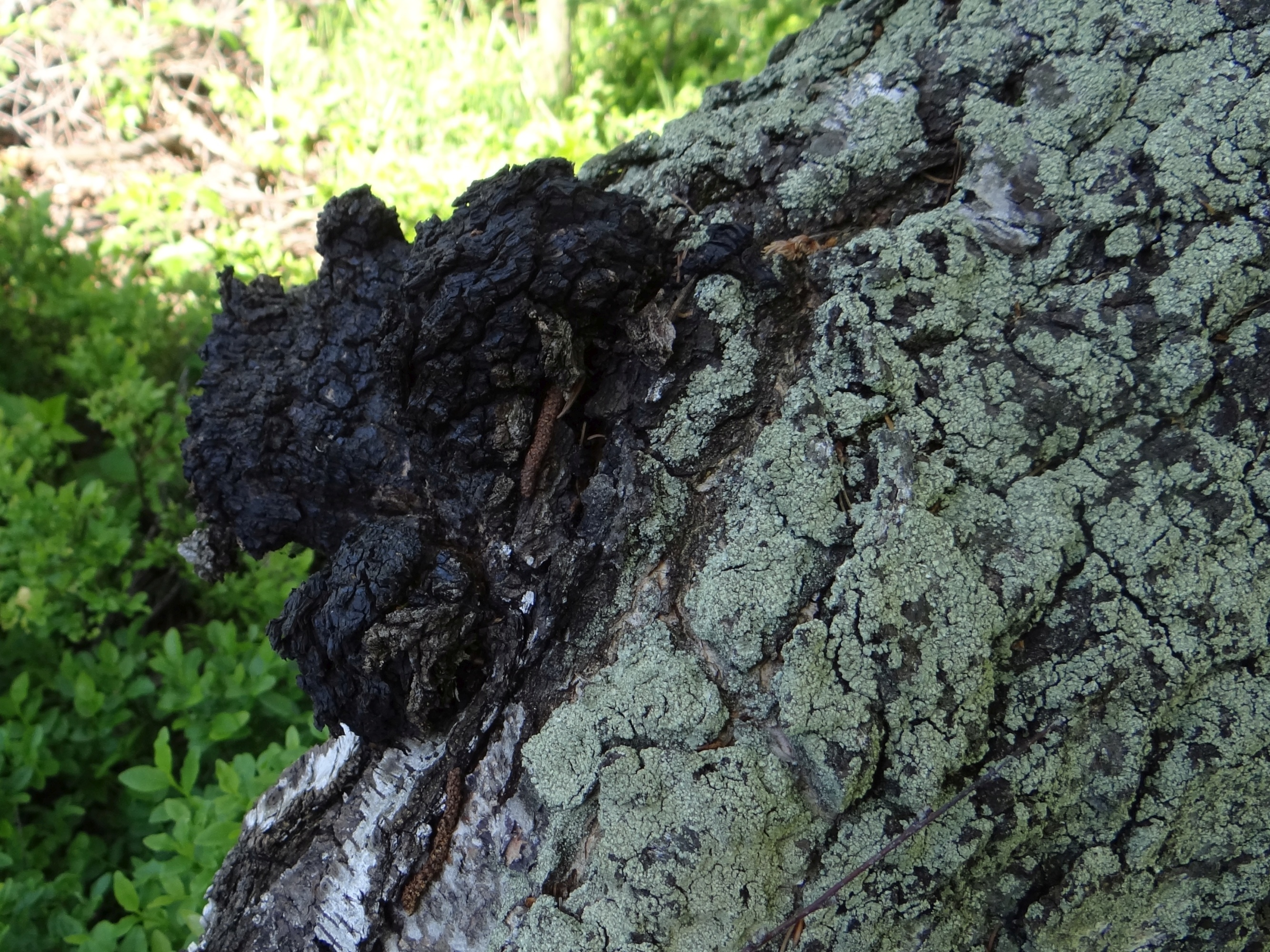 Inonotus obliquus (location: Poland, Beskid Mały, Magurka Wilkowicka)